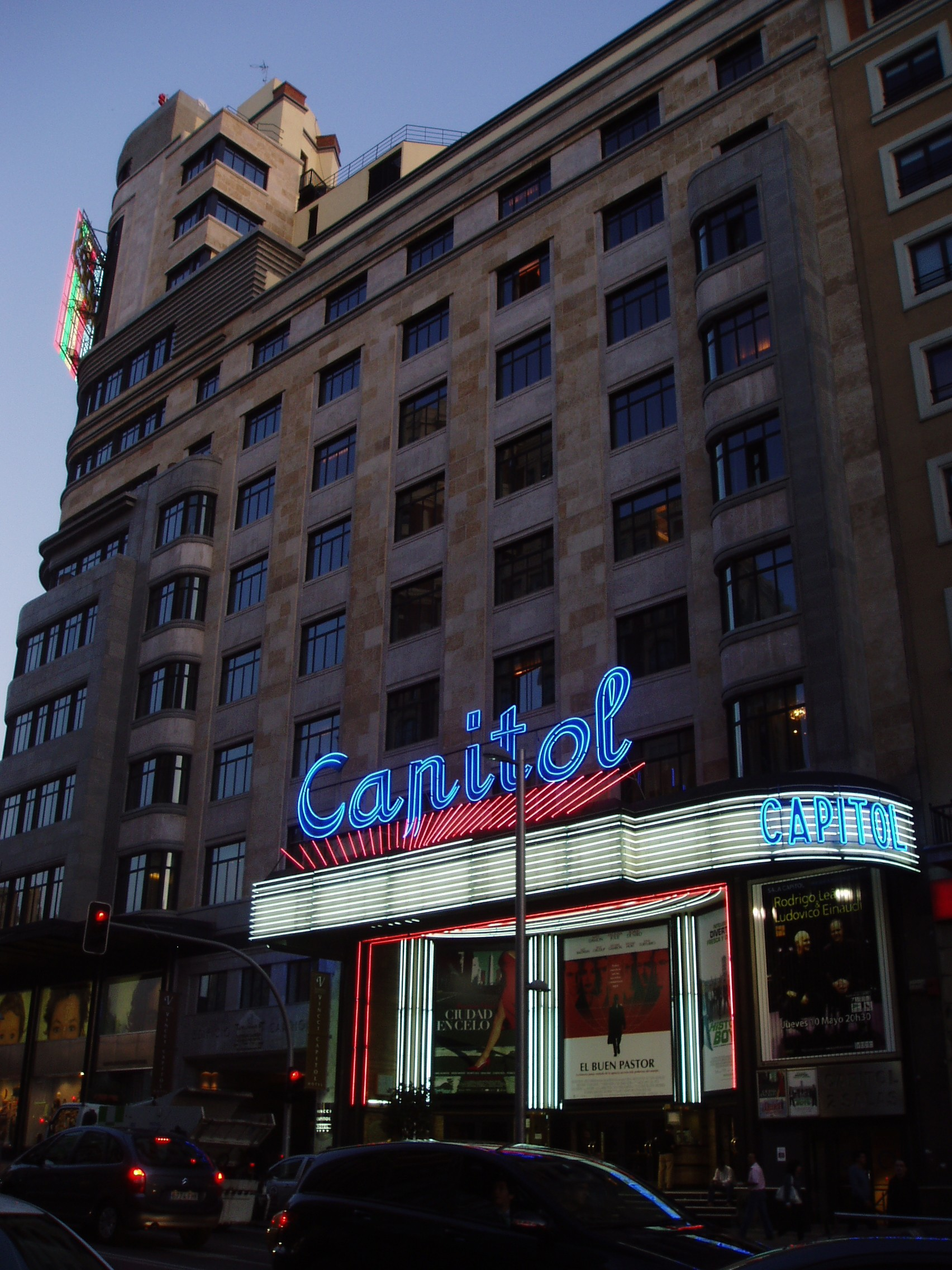 Cine Capitol (Edificio Carrión), en la Gran Vía, Madrid, España.